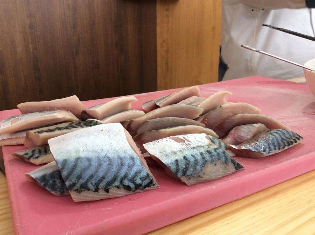 Lomos de xarda listos para cociñar.